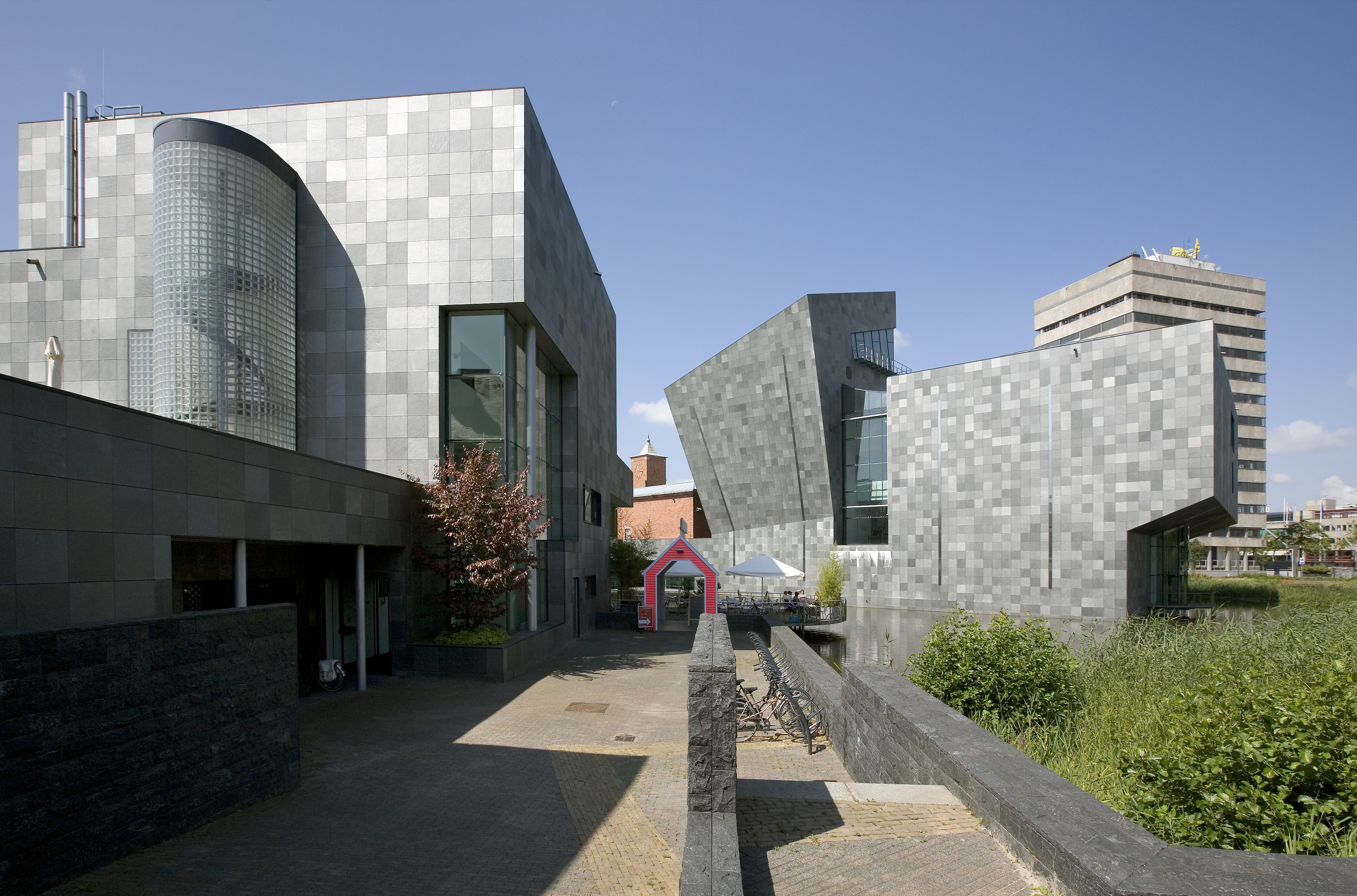 van Abbemuseum: Zicht op de rechter zijgevel van de nieuwbouw, restaurant op de voorgrond links